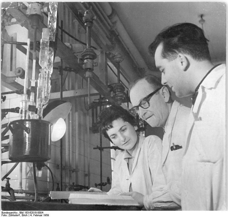 Zentralbild-Zühlsdorf Zü-Qu 4.2.1959 Produktionsverpflichtungen im VEB Berlin-Chemie. Die Werktätigen des VEB Berlin-Chemie in Berlin-Adlershof haben sich verpflichtet, ihre Produktion erheblich zu steigern. Das wird erreicht durch Anwendung der Seifert-Methode, Auswertung von Verbesserungsvorschlägen und durch technische und chemische Veränderungen. Allein durch die Verbesserung der Arbeitsorganisation erreicht die Abteilung Sulfonamide gegenüber sieben Ansätzen neuerdings acht Ansätze im Monat. Zehn Kollegen dieser Abteilung schliessen im Februar ihre Qualifizierung für einen zweiten Beruf ab und fünf weitere Kollegen werden in diesem Jahr zu einem Lehrgang delegiert. UBz. (Von rechts nach links): Chemieingenieur Kurt Richter, Abteilungsleiter Ewald Wegner und Diplomchemikerin Ingrid Hahn beraten anhand von Proben über die Ausführung eines Verbesserungsvorschlages zur Steigerung der Qualität der Sulfonamide.